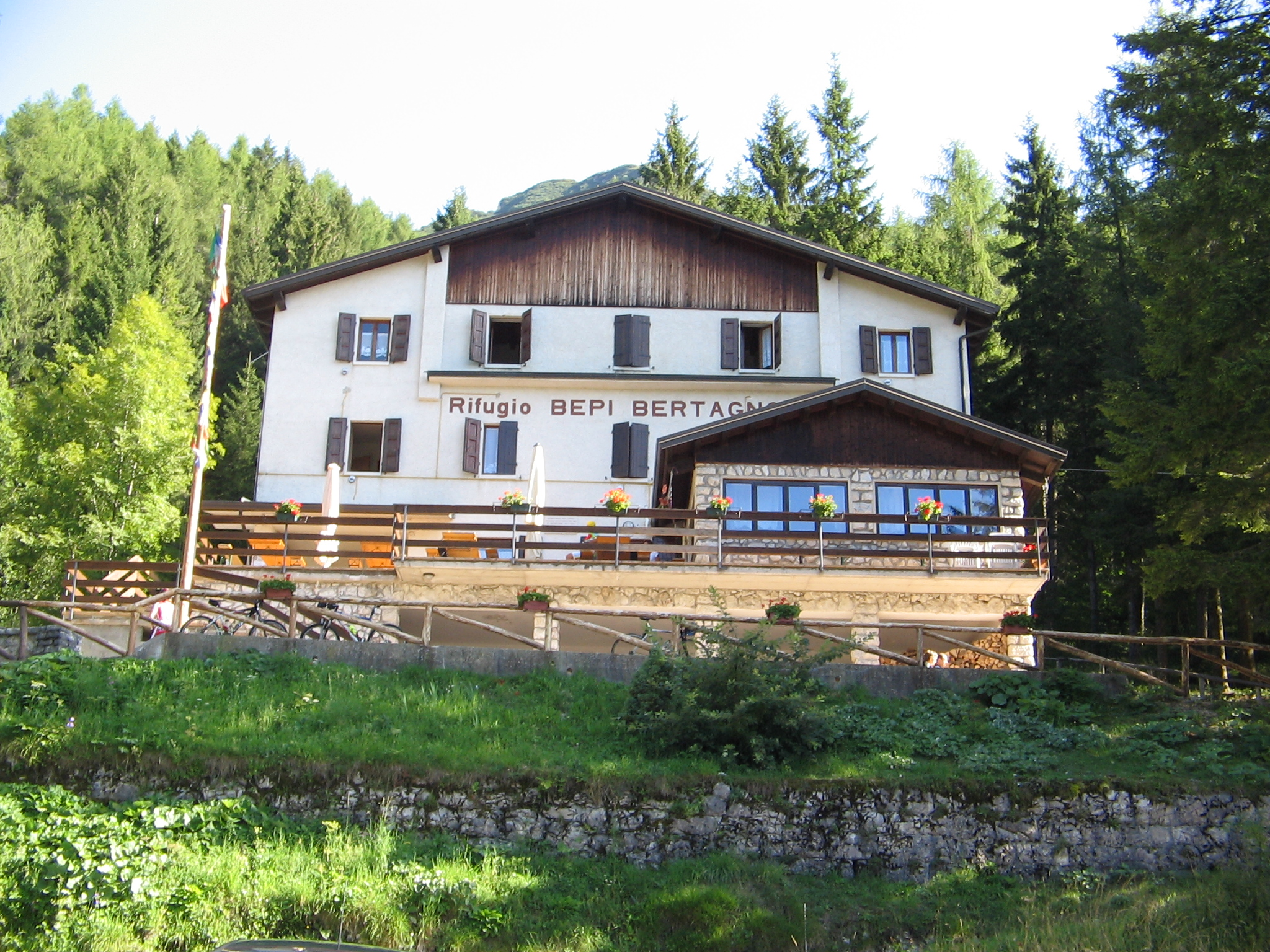 Rifugio Bertagnoli, Catena delle Tre Croci, Piccole Dolomiti